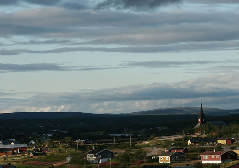 Kautokeino med Kautokeino kyrkje